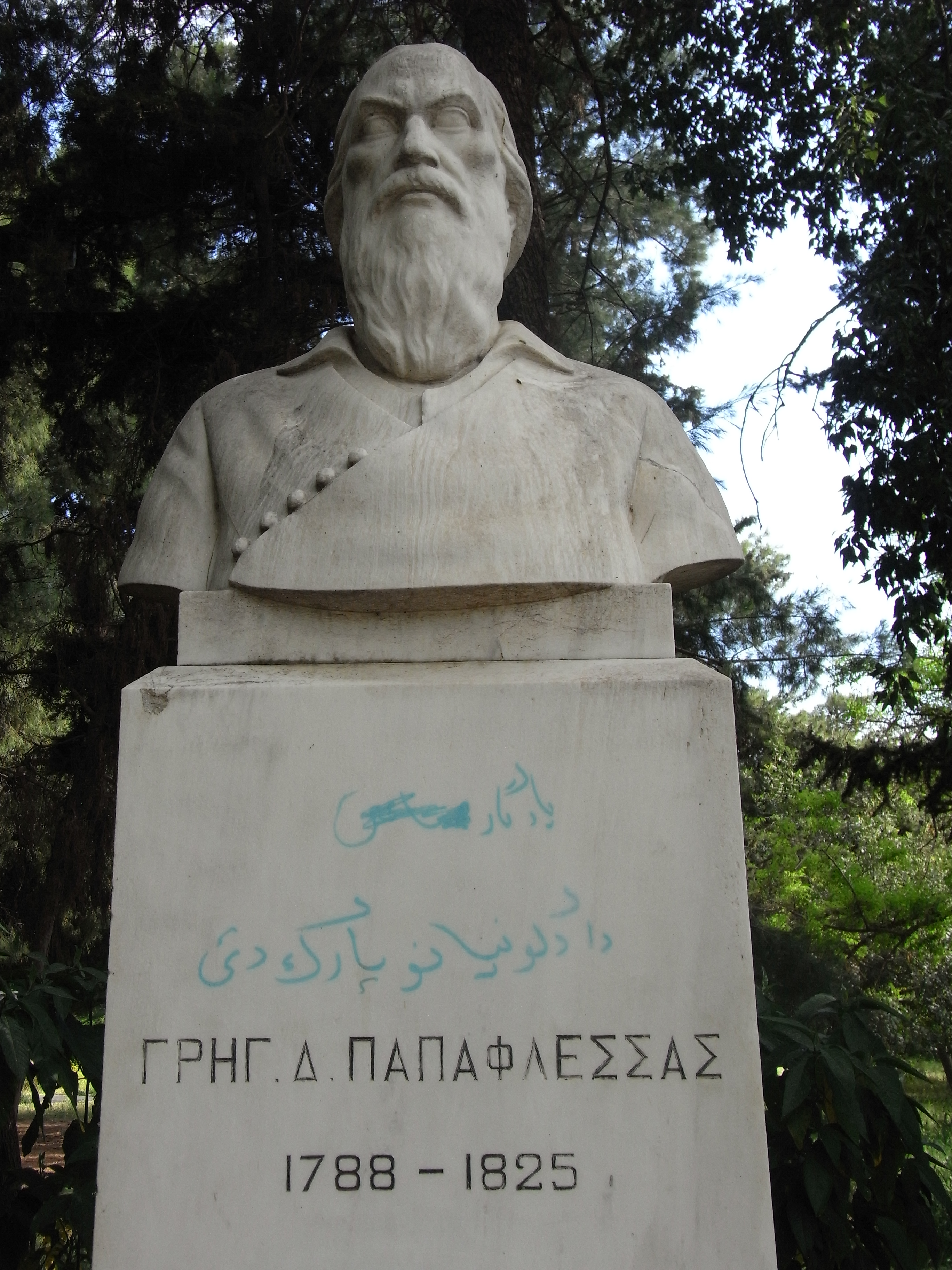 Les combattants de 21 (Αγωνιστές του 21)